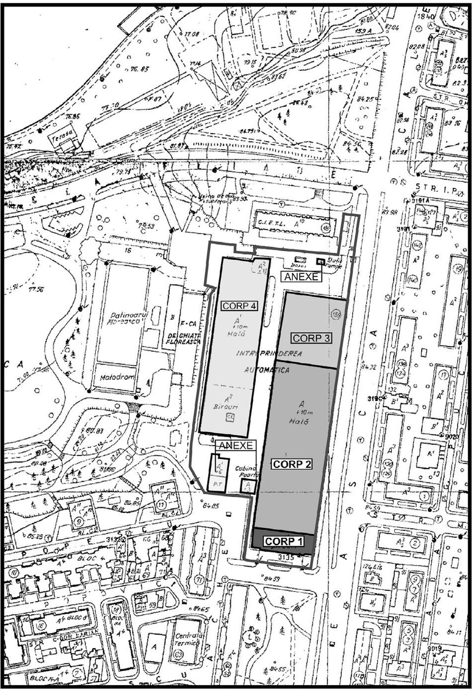 Schema întreprinderii Automatica, așa cum apare în Ordinul Ministrului Culturii nr. 2.001/9 februarie 2008. Clădirile 1 și 2 sunt monumente istorice.